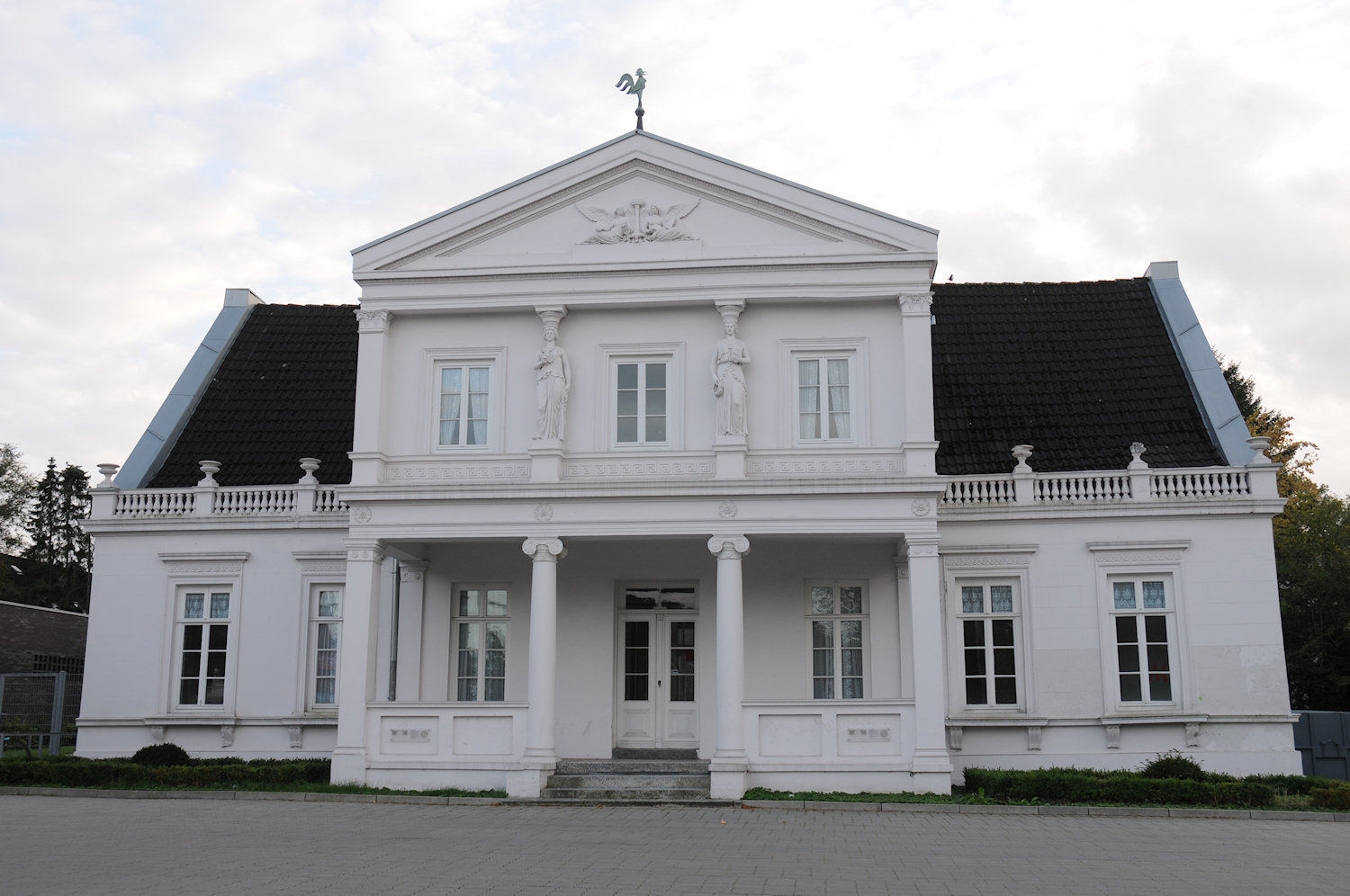 Landhaus Louisenthal - Bremen, Leher Heerstraße 105 Das abgebildete Objekt ist ein geschütztes Kulturdenkmal in der Freien Hansestadt Bremen, mit der Nr. 0842 beim Landesamt für Denkmalpflege registriert.